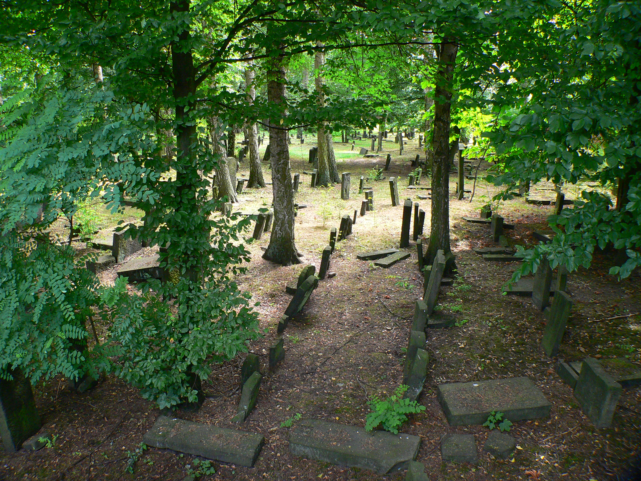 Jüdischer Friedhof Hamburg-Altona